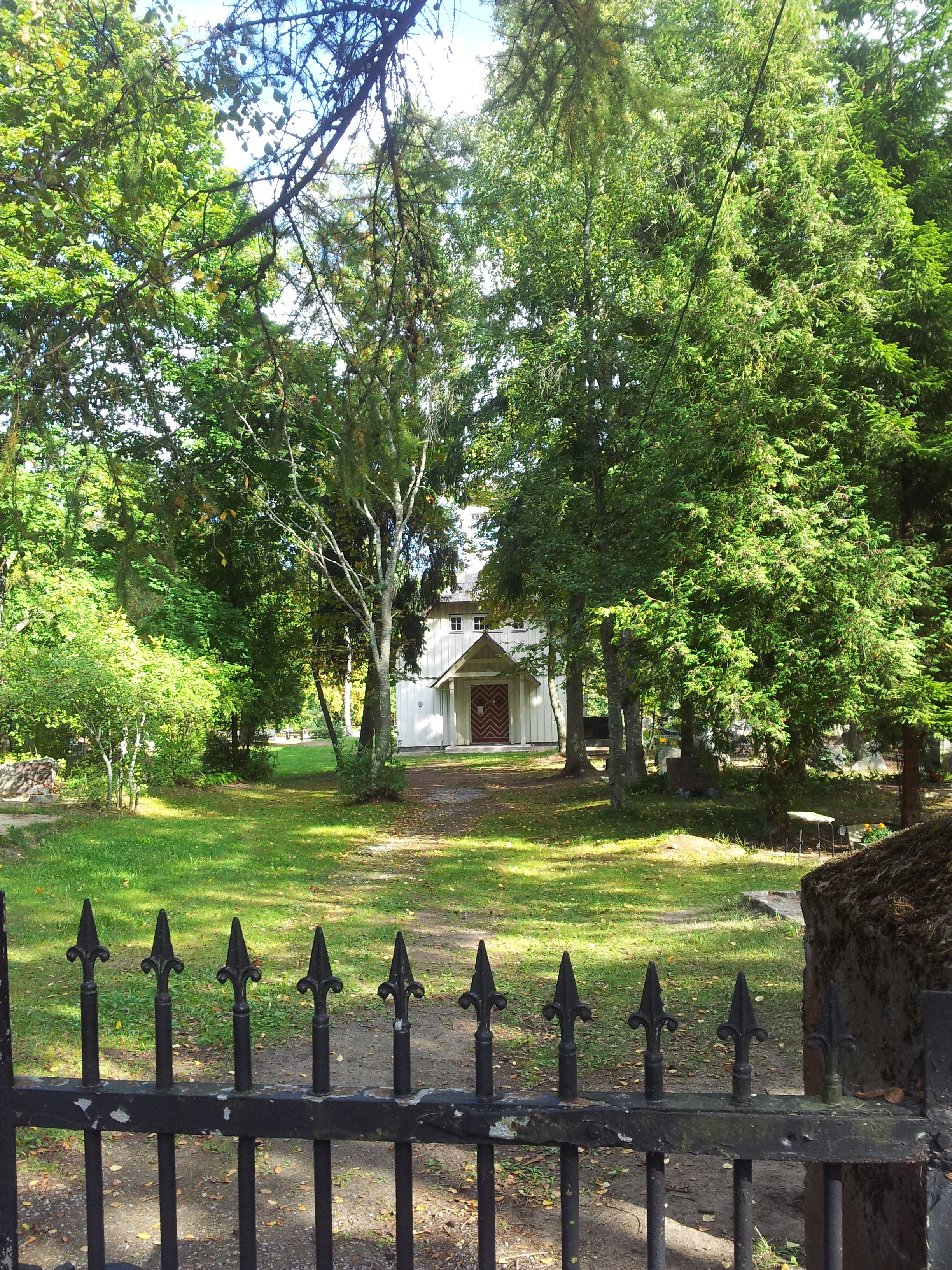 Rohuneeme kalmistu